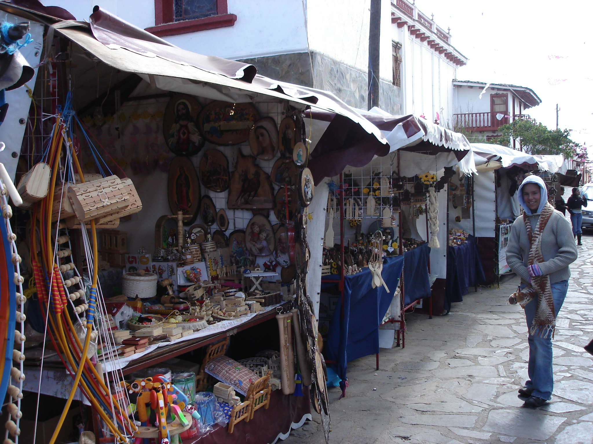 Chacharas de Mazamitla, estado de Jalisco, México.